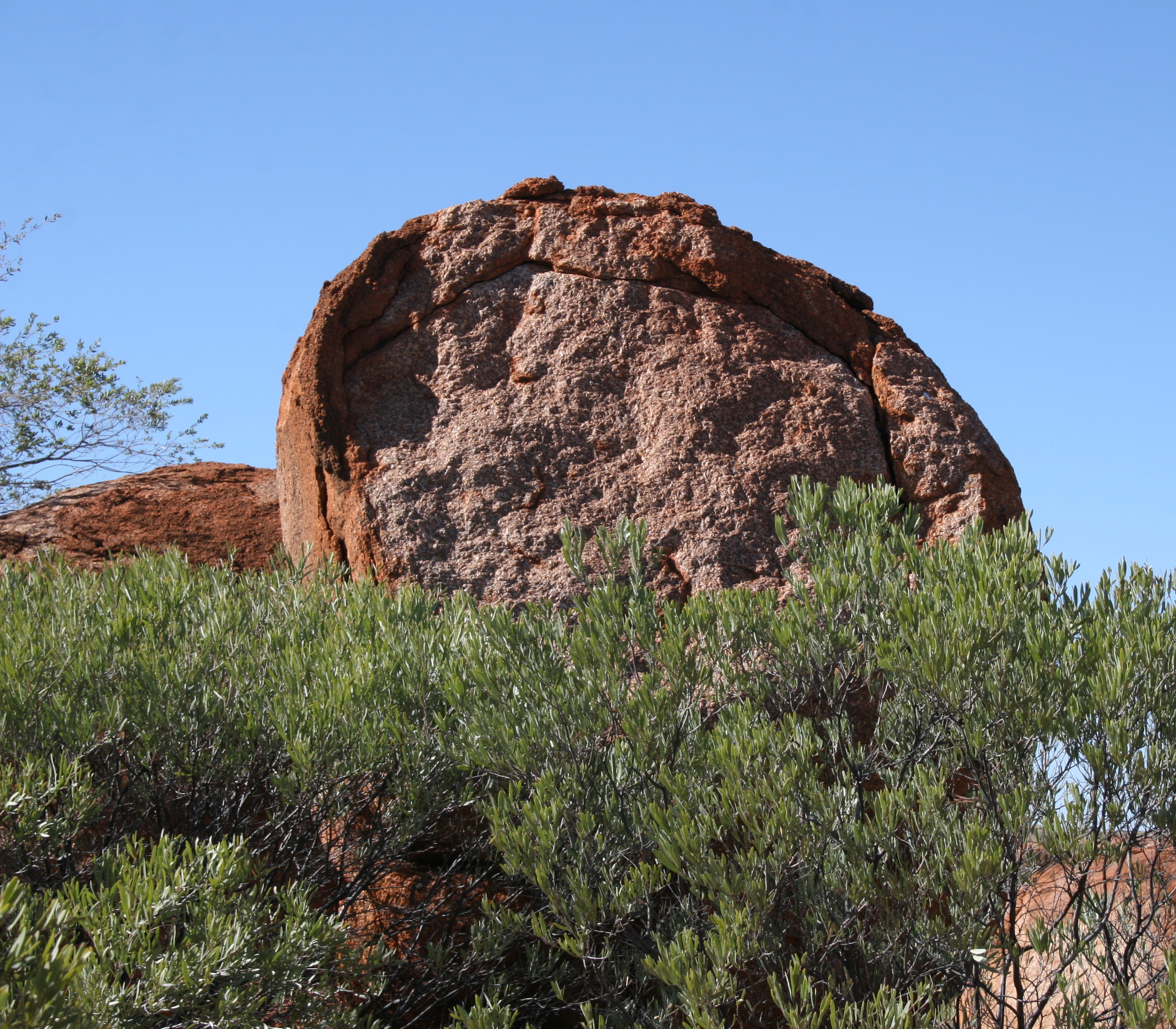 Wollsackverwitterung: Vergrusung eines Devil Marble's